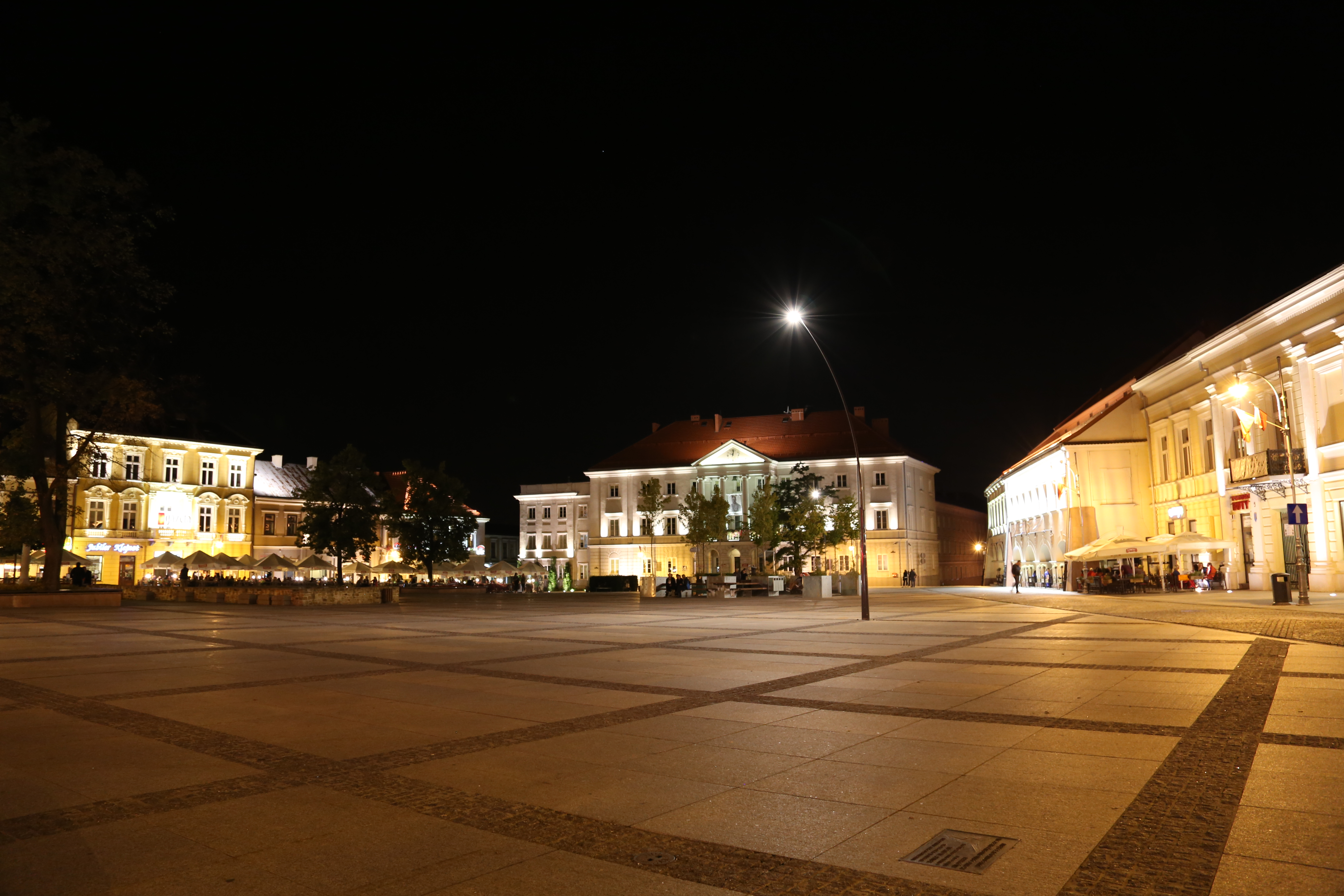 Kielce, Rynek z wylotami ulic: Piotrkowska, Kozia, Warszawska, Bodzentyńska, Mała i Leśna, XIV, XX w.